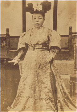 순헌황귀비의 양장 사진